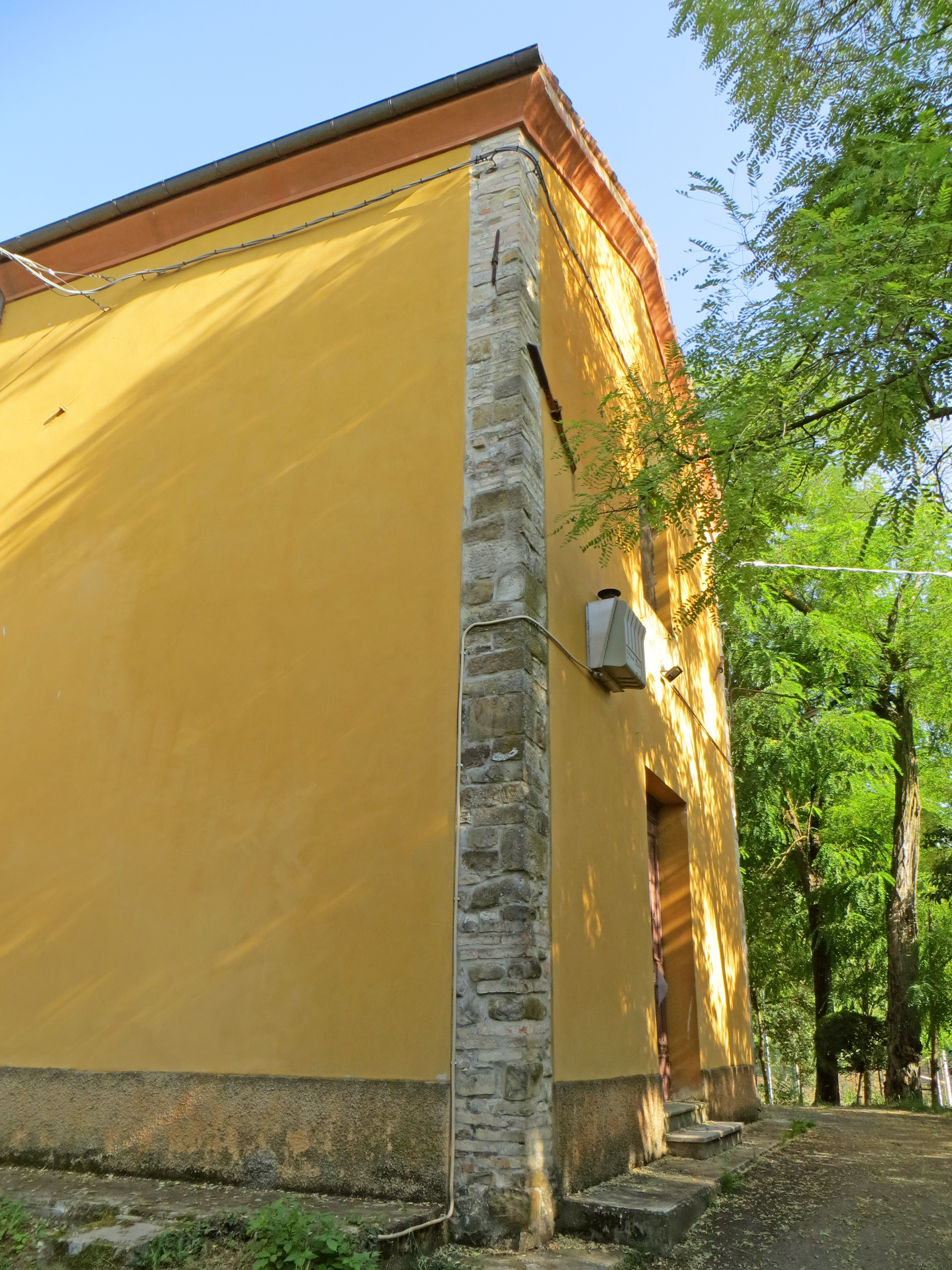 Chiesa dell'Assunzione di Maria Vergine (Vignale, Traversetolo) - facciata